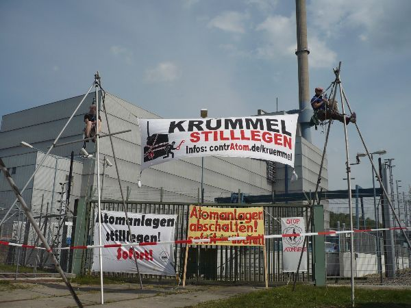 Protest vor dem Kernkraftwerk Krümmel anlässlich des 23. Jahrestages der Katastrophe von Tschnernobyl.